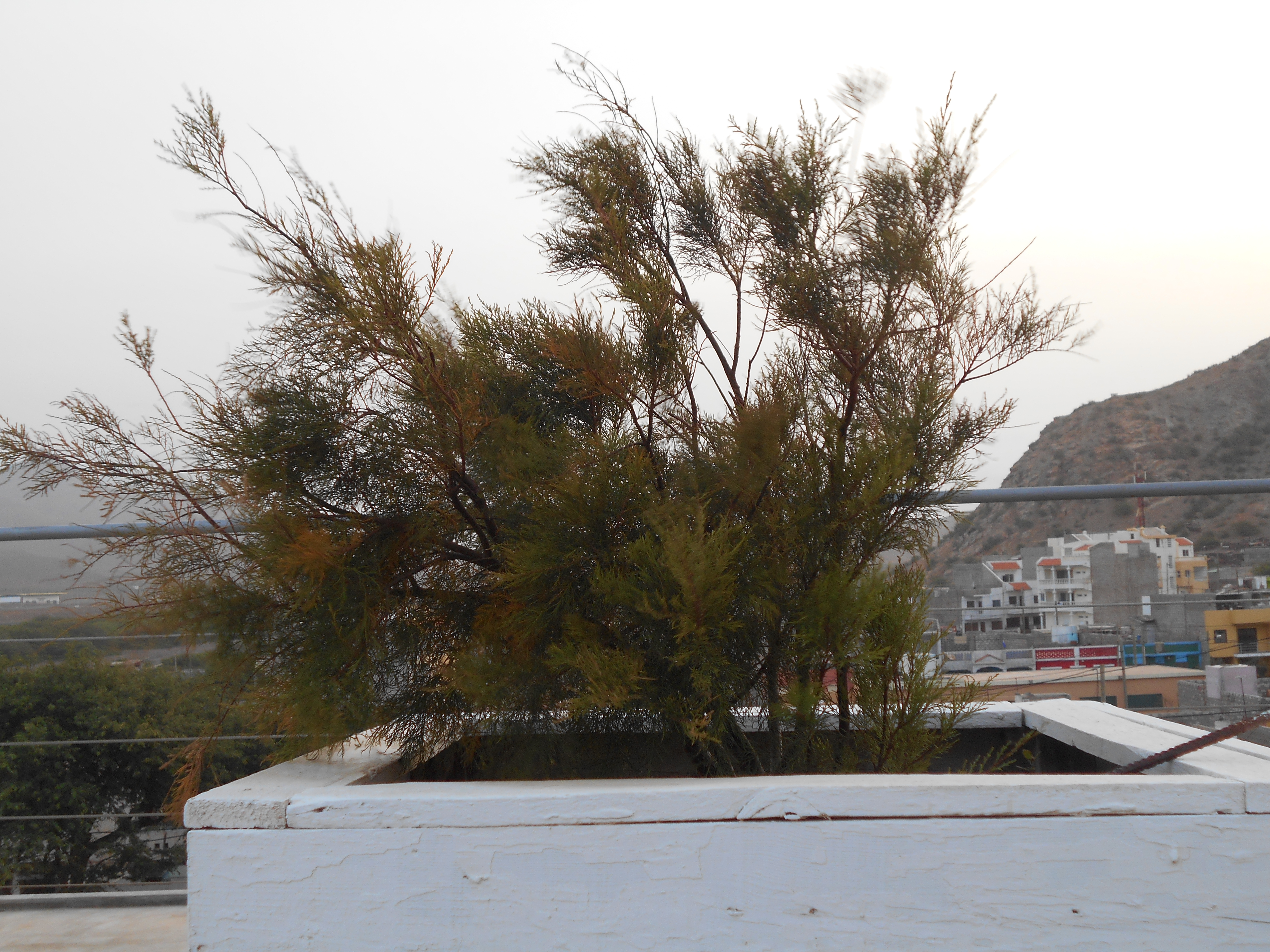 Arbusto di Tamarix Senegalensis